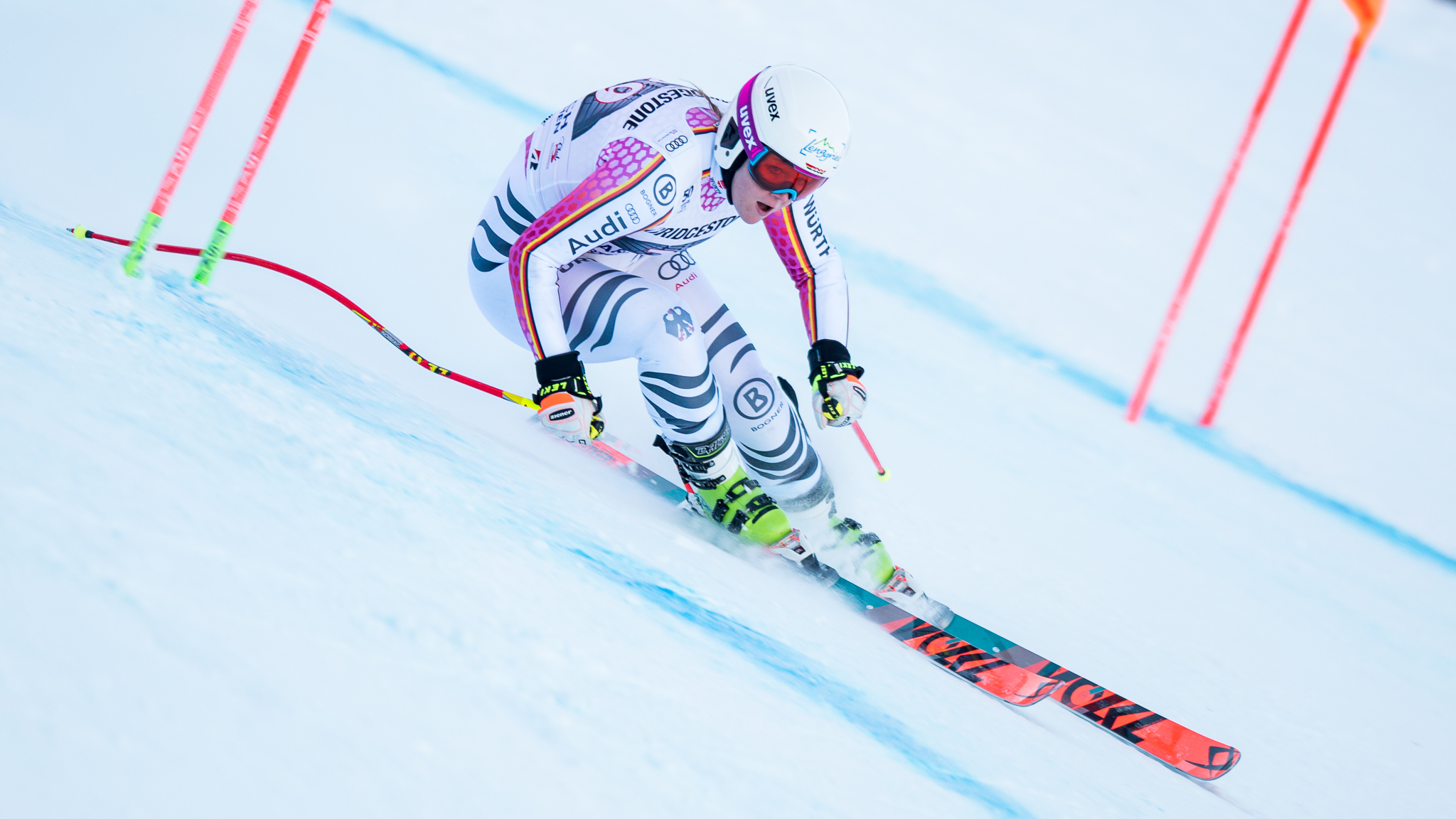 64. Kandahar Rennen,Audi FIS Ski Weltcup Garmisch-Partenkirchen,Damen Abfahrt,Kandahar,Ladies Downhill,Michaela Wenig